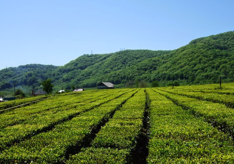 Чайные плантации у аула Ахинтам